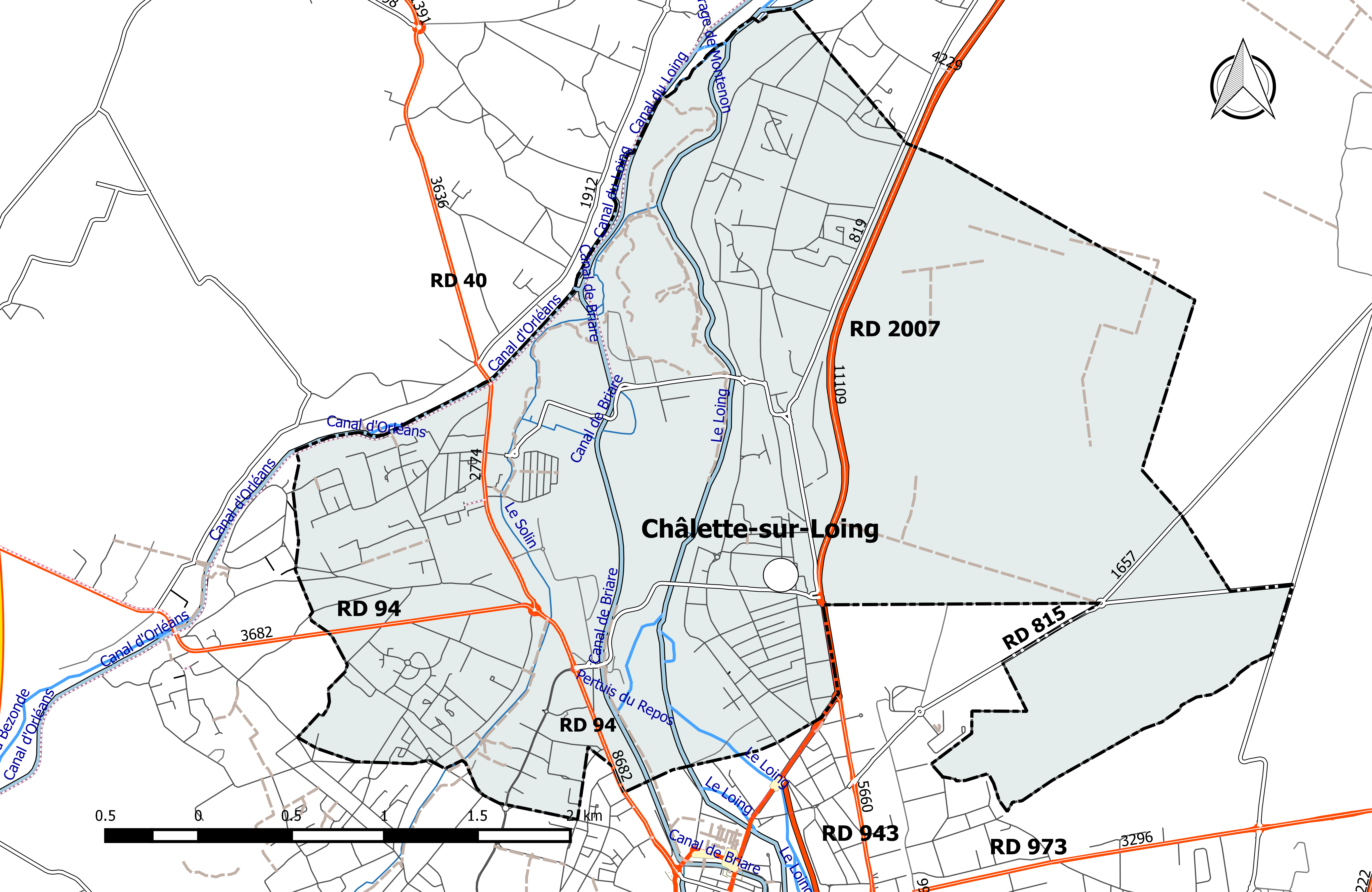 Carte du réseau routier de la commune de Châlette-sur-Loing.